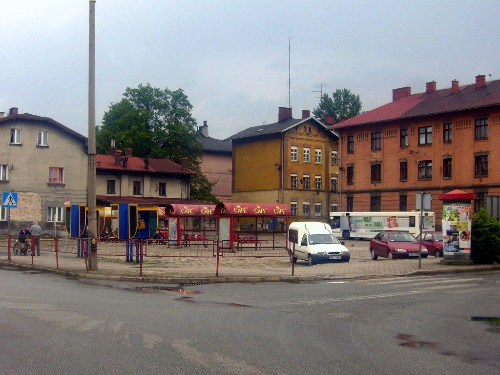 Dworzec komunikacji miejskiej na pl. Wolności w maju 2010.